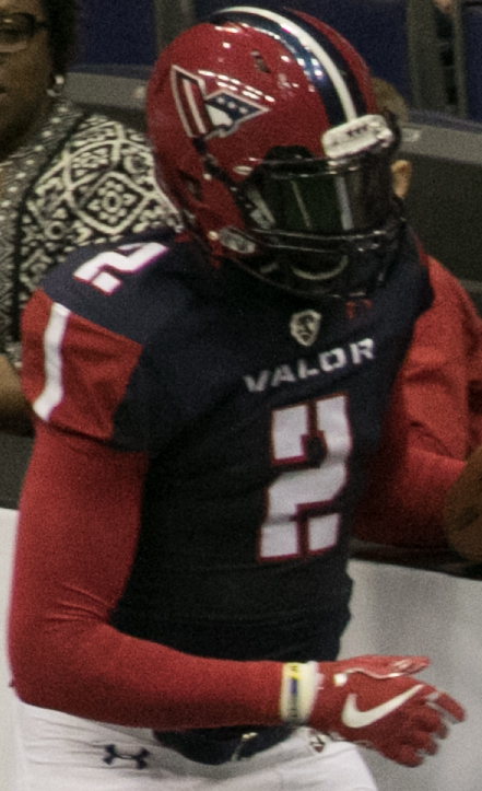 Valor 47 / Philadelphia Soul 48